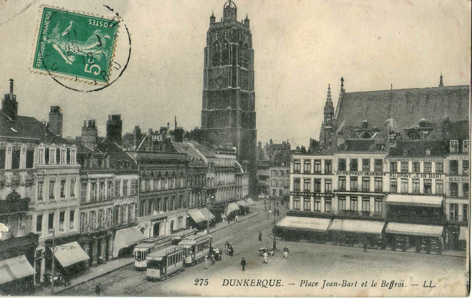 Carte postale ancienne éditée par LL, n°275 :DUNKERQUE - Place Jean-Bart et le Beffroi